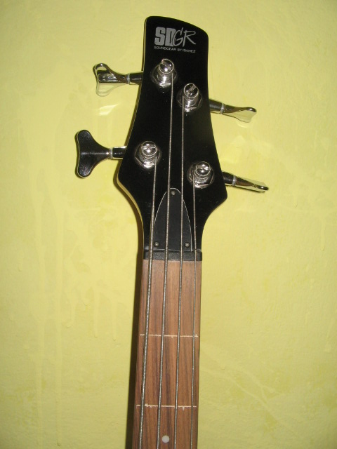 Ibanez SDGR DX 300 fretless bass (glava)